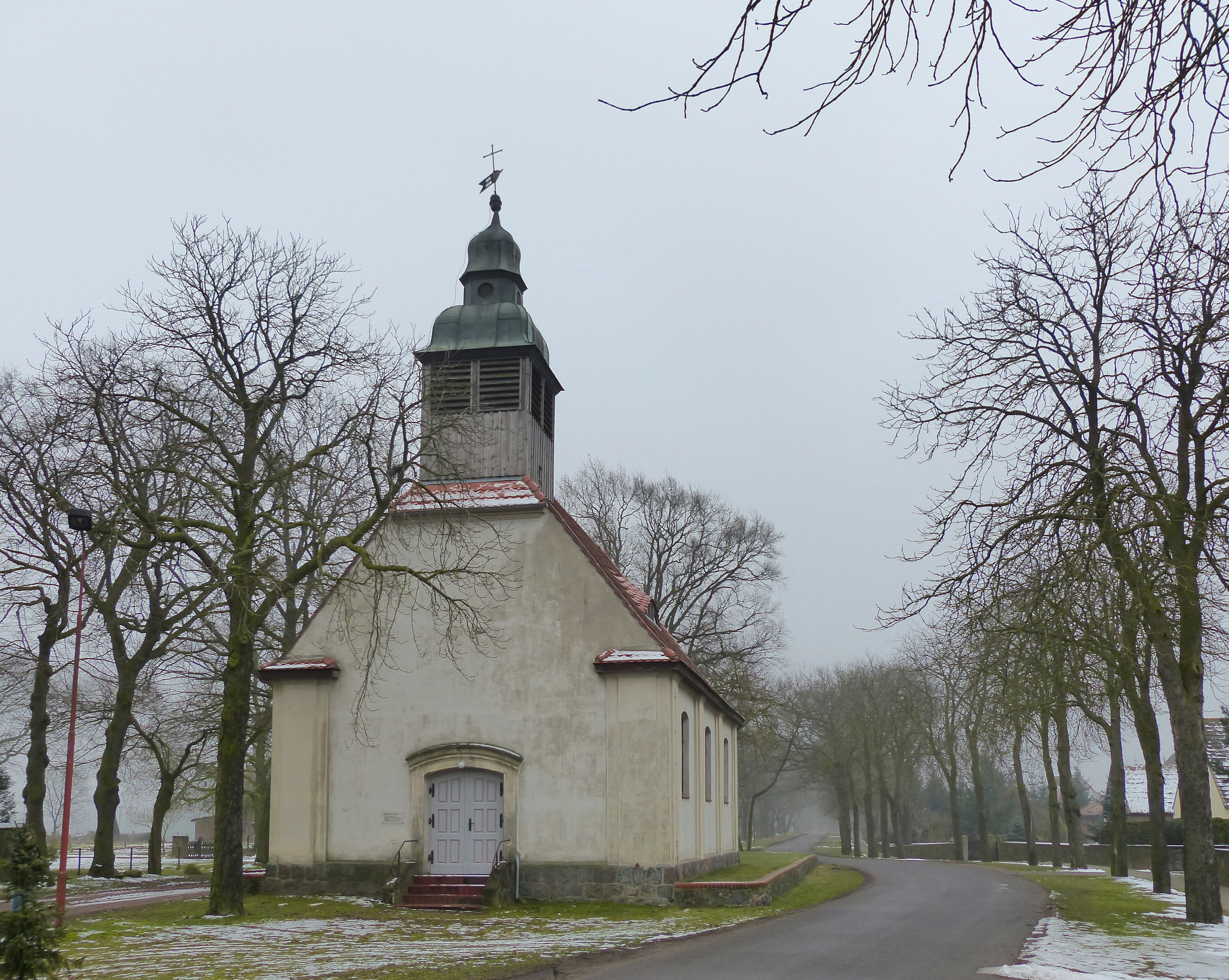 Blumenthal bei Ferdinandshof, Evangelische Kirche, Ansicht von Westen